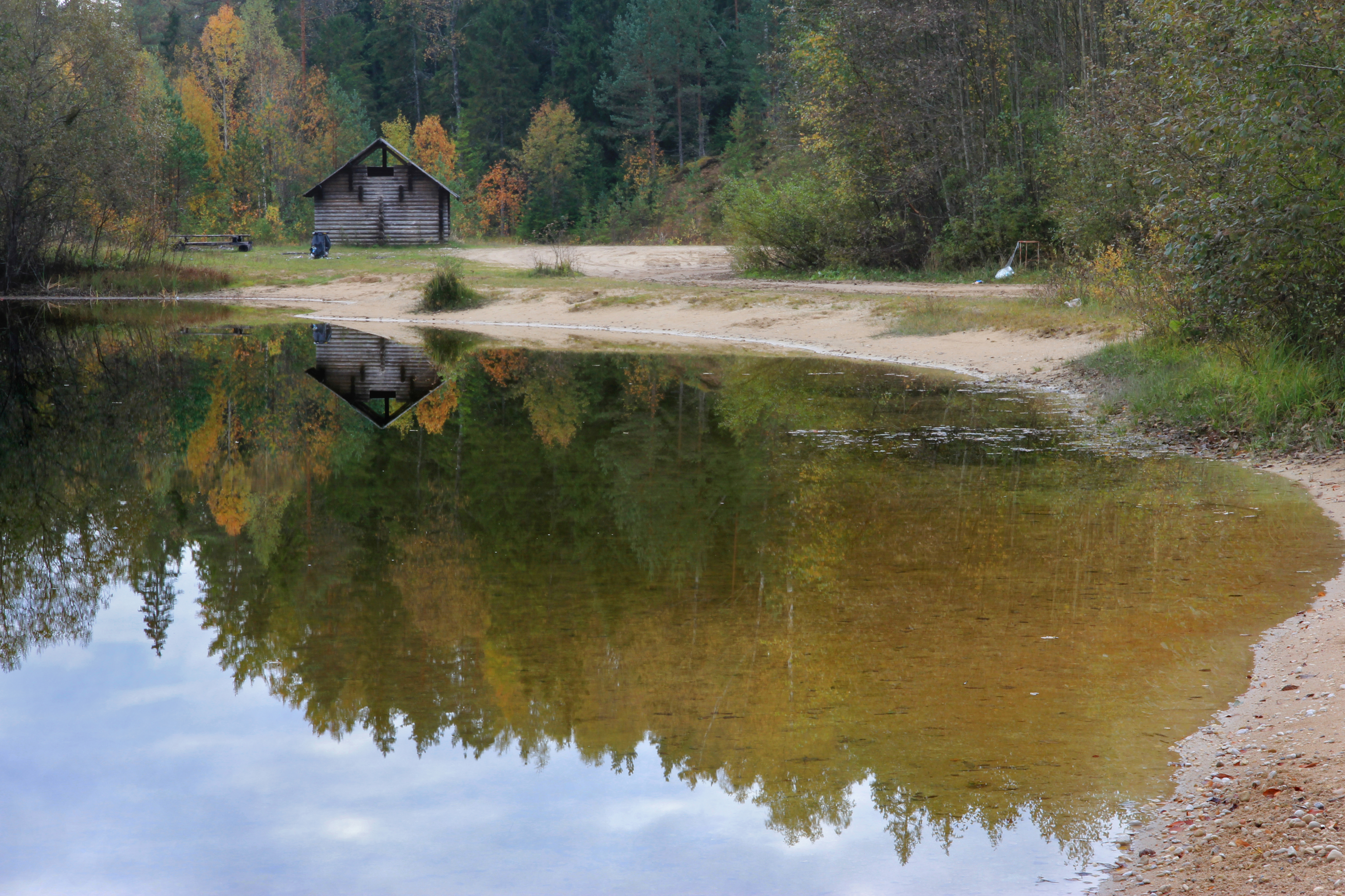 Seljajärv.